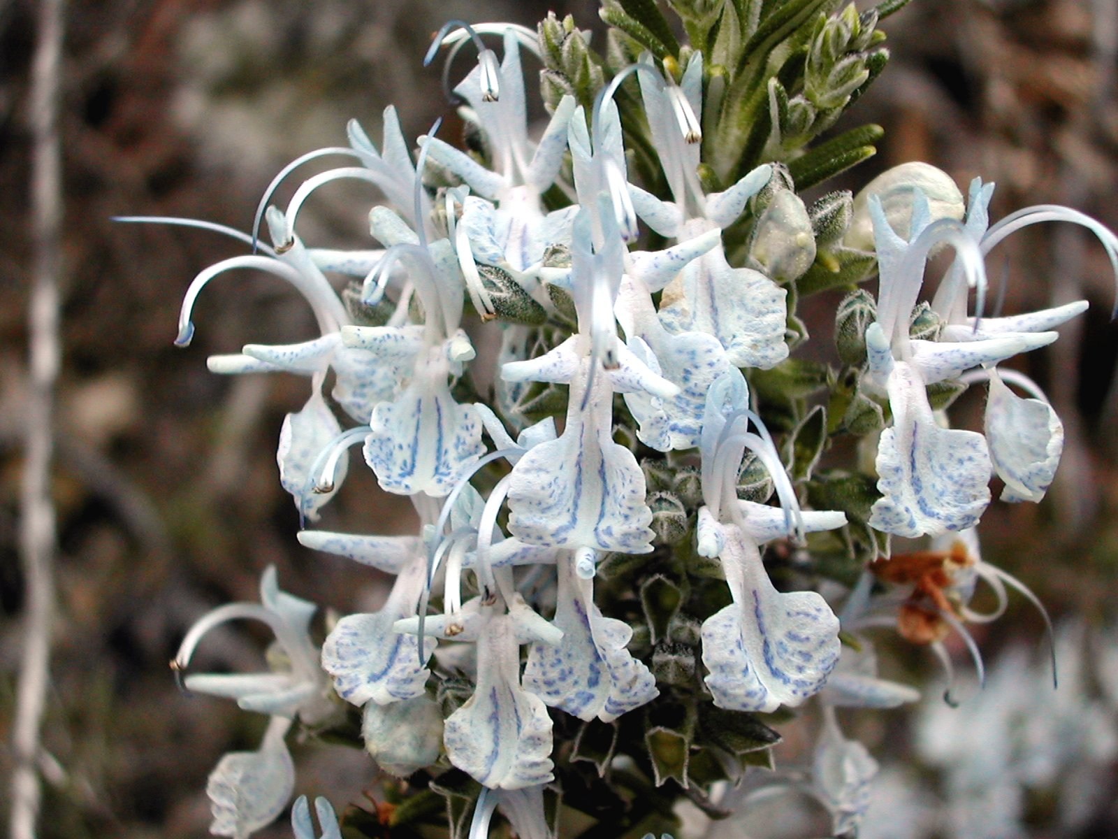 Rosmarinus officinalis - flowers, Sant Llorenç de Munt (Catalonia)